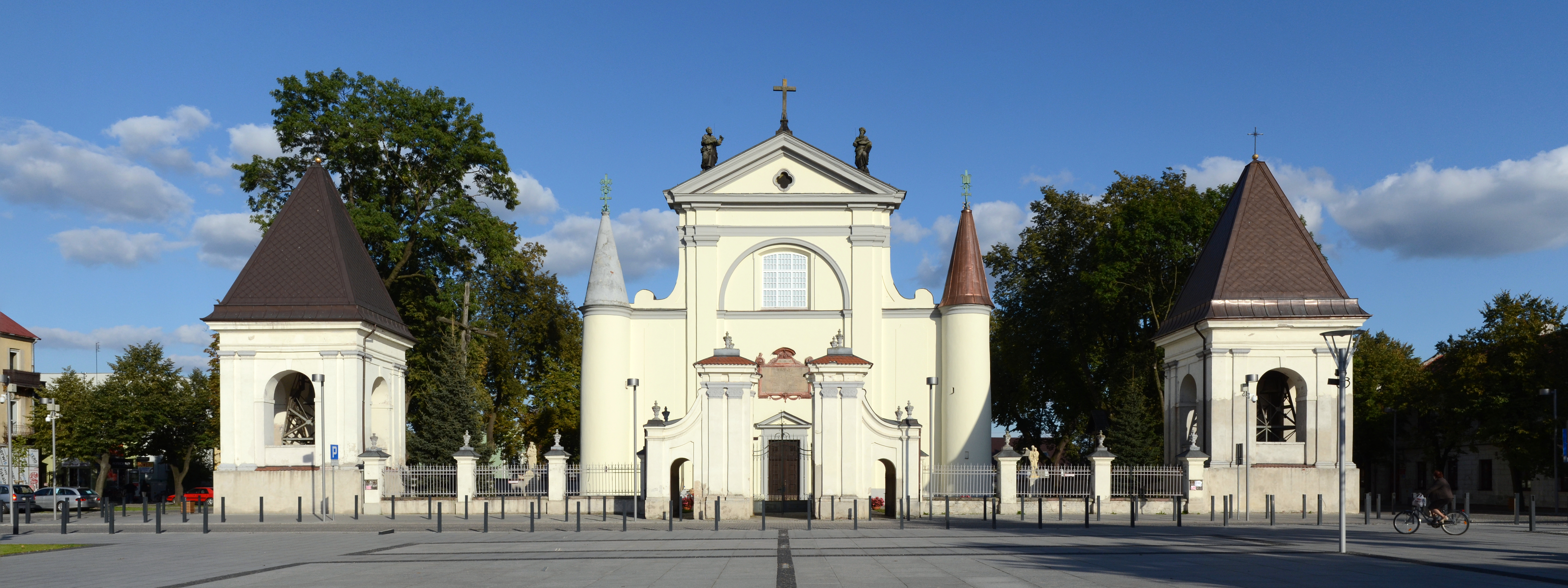 Kościół Wniebowzięcia Najświętszej Marii Panny przy Rynku Mariackim w Węgrowie